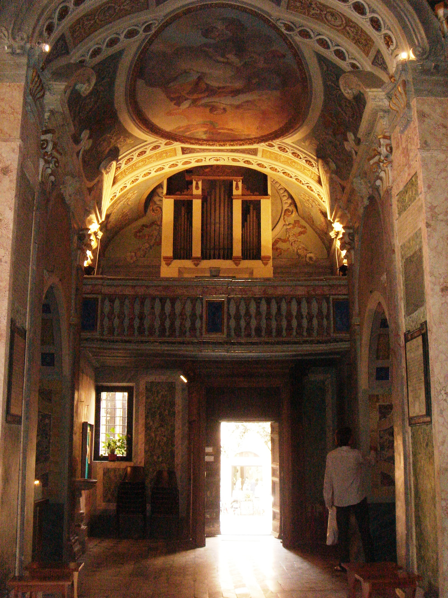 Roma, Santa Barbara dei Librai: il piccolo organo